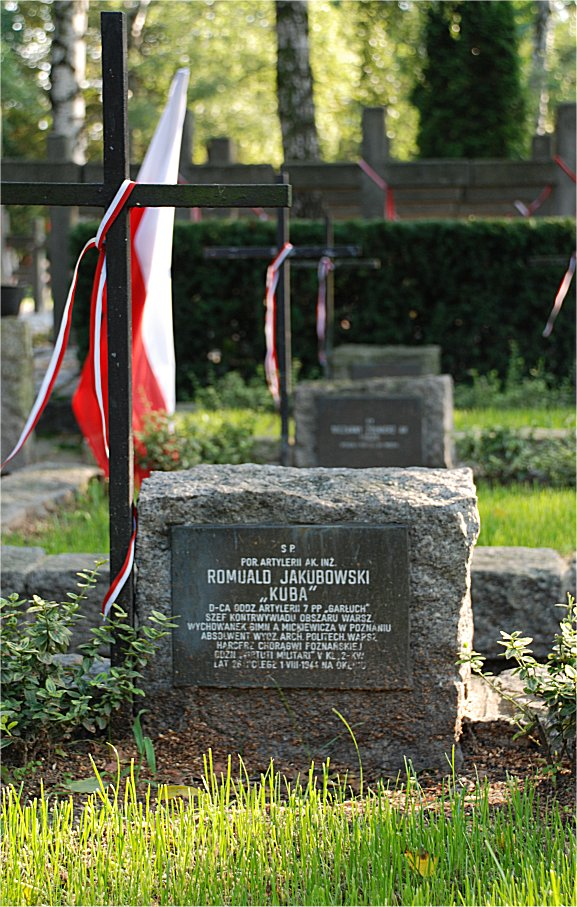 Grób Romualda Jakubowskiego, Powązki Wojskowe, Warszawa